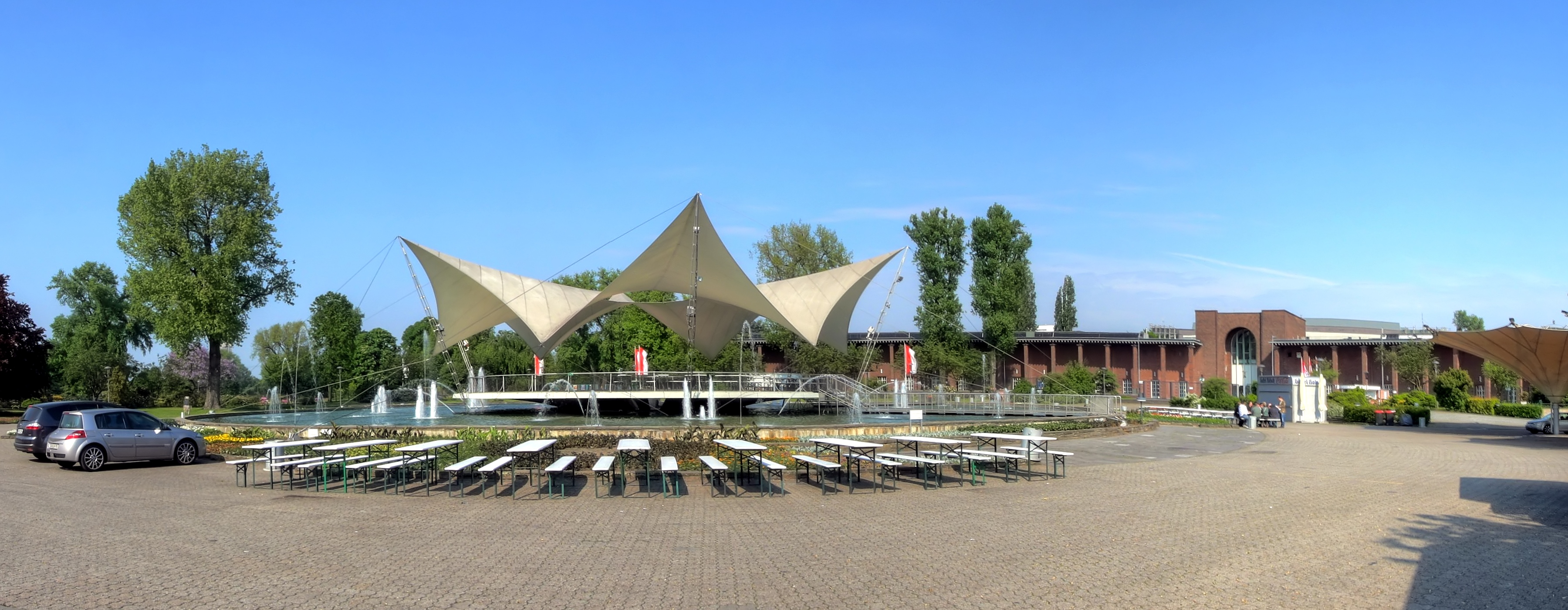 Tanzbrunnen Köln, Teil vom Rheinpark. Baujahr: 1957. Architekt: Josef Op Gen Oorth. Überdachung: Frei Otto. Rechts hinten: das Staatenhaus This is a photograph of an architectural monument.